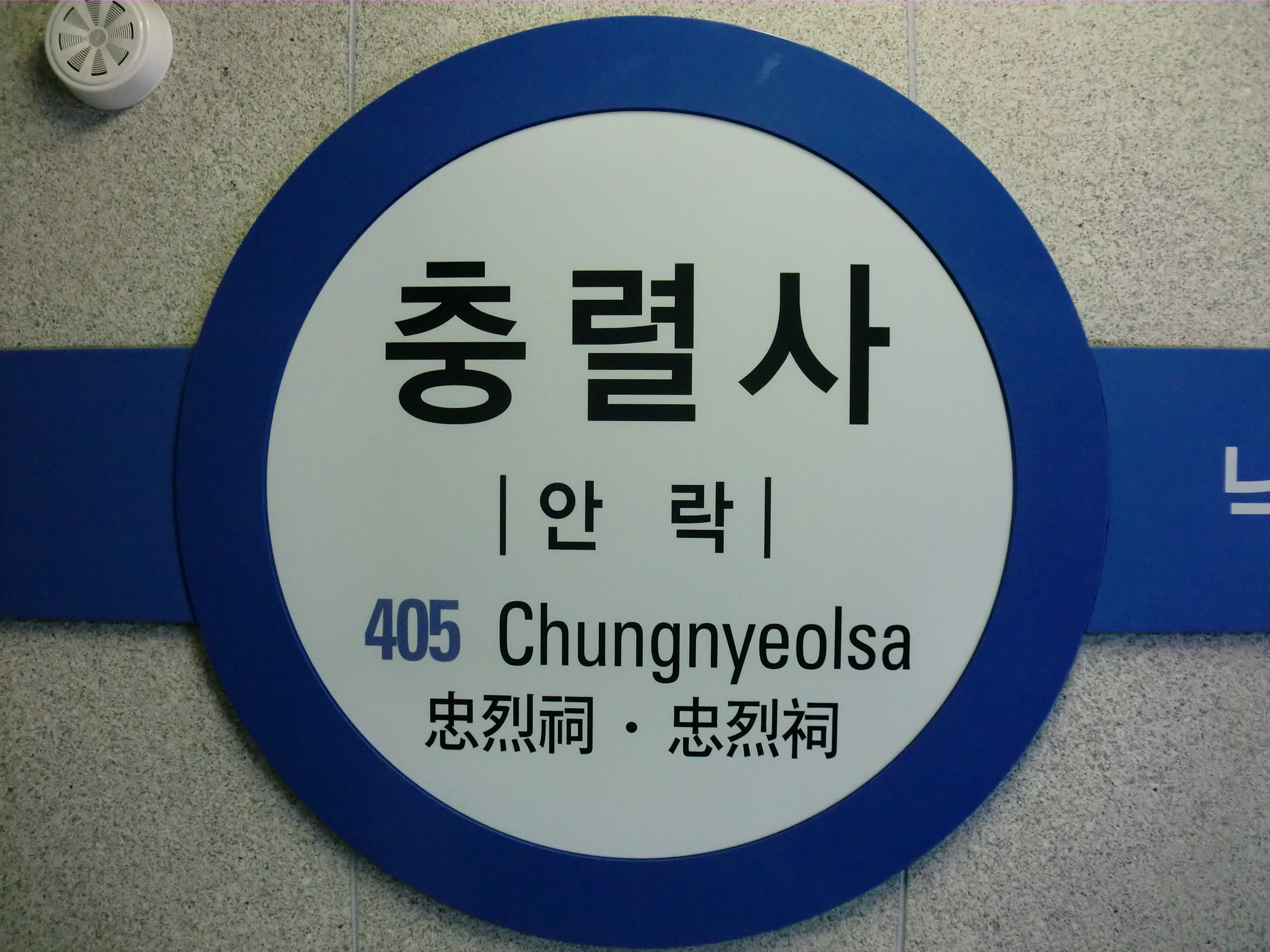 부산도시철도 4호선 충렬사역의 역명판